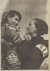 Solidarité Internationale Antifasciste (SIA) est fondée en Espagne en juin 1937 par la Confédération nationale du travail (CNT) avec les autres organisations libertaires, la Fédération anarchiste ibérique (FAI) et la Fédération ibérique des jeunesses libertaires (FIJL).